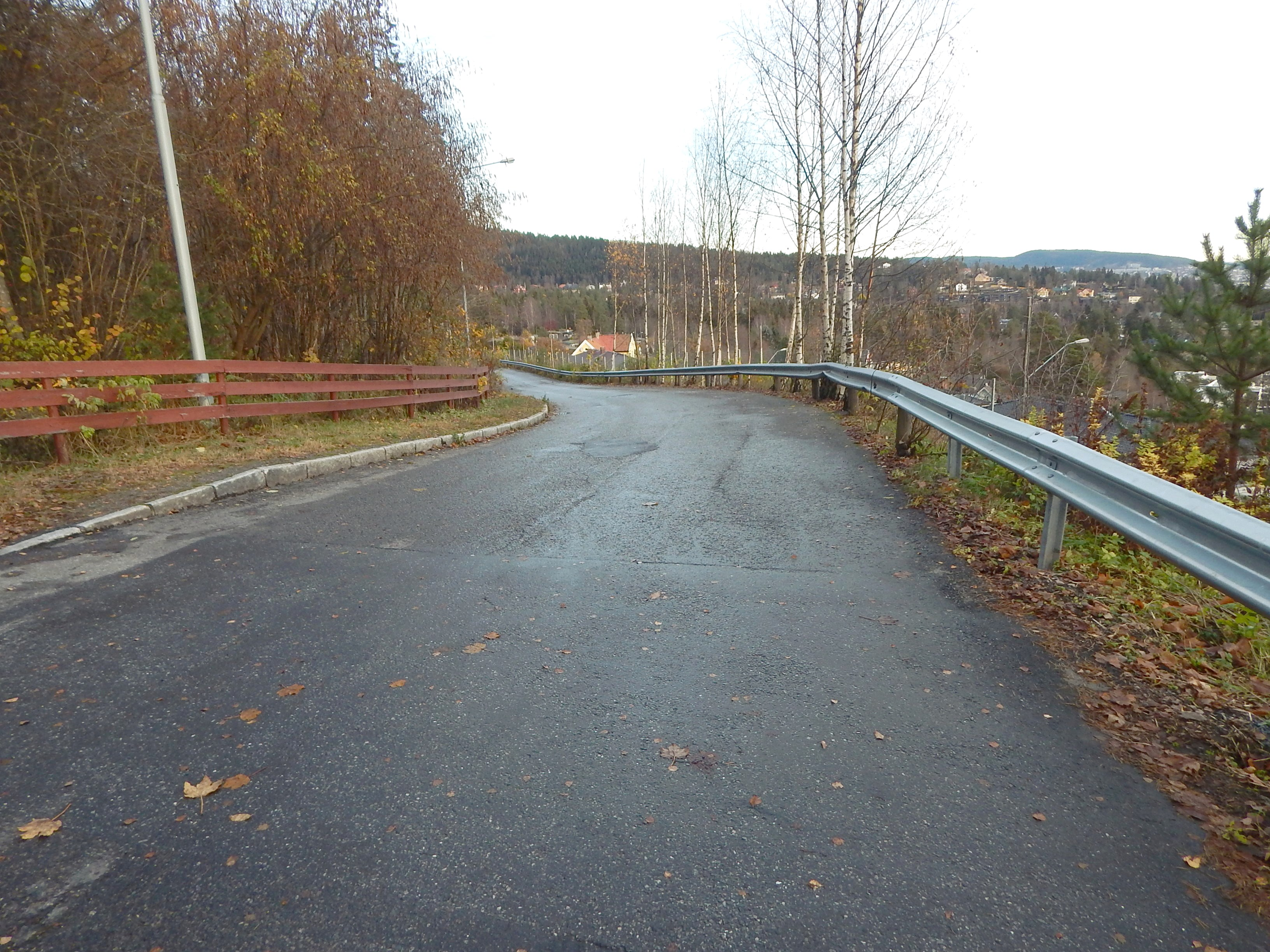 Midtstugrenda sett fra Doktor Holms vei